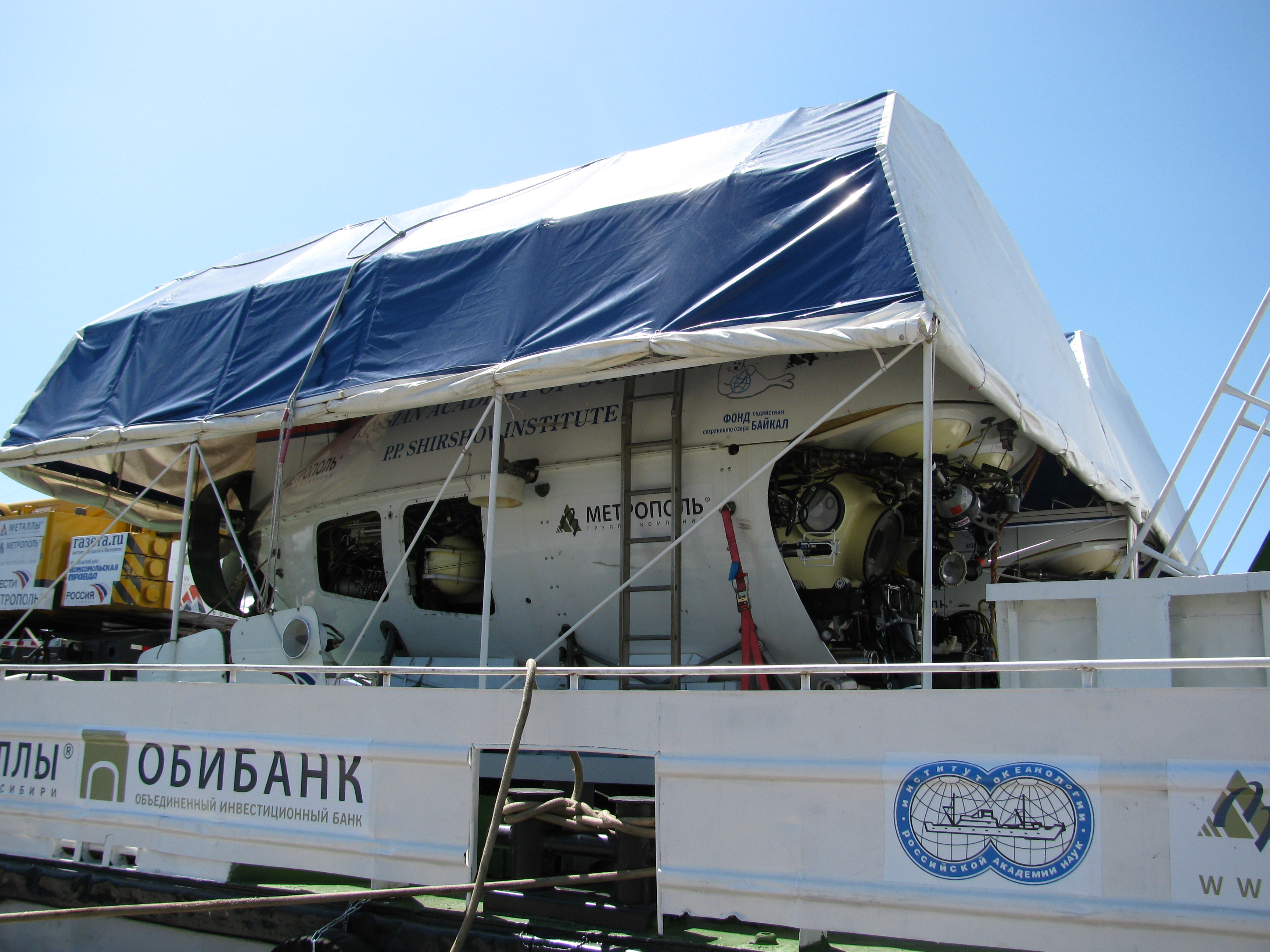 Грузовая баржа в порту села Турка на озере Байкал., с глубоководными обитаемыми аппаратами МИР-1 и МИР-2 на борту.